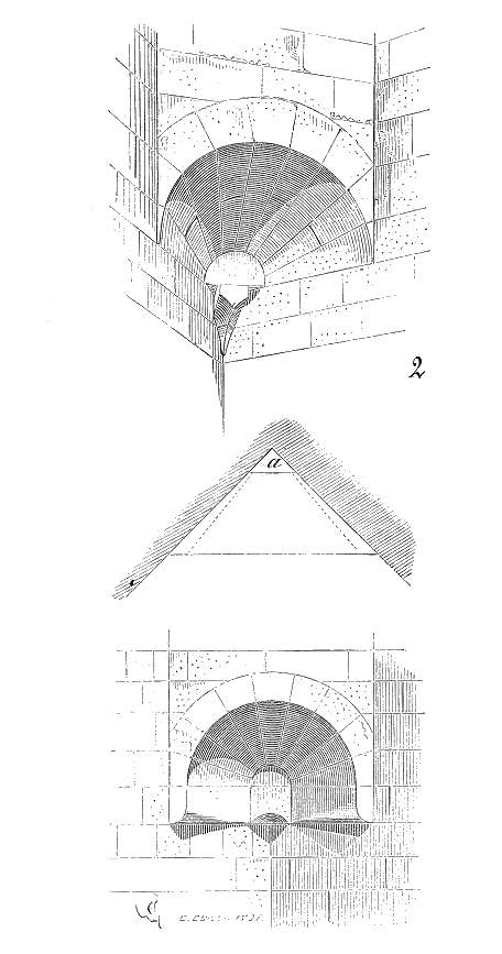 ... Au XIIe siècle apparaissaient aussi déjà des trompes coniques, ainsi que le montre la figure 2. Pour éviter la réunion des angles très-aigus des claveaux composant la trompe, au sommet du cône, les appareilleurs ont souvent établi un morceau de pierre demi-circulaire à la place de ce sommet en a; ils formaient ainsi un petit cintre sur lequel repose l'intrados des claveaux ...